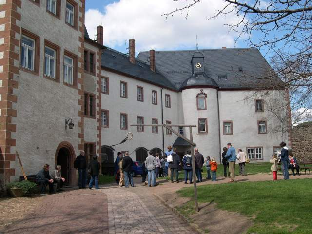 Innenhof der Burg Mildenstein